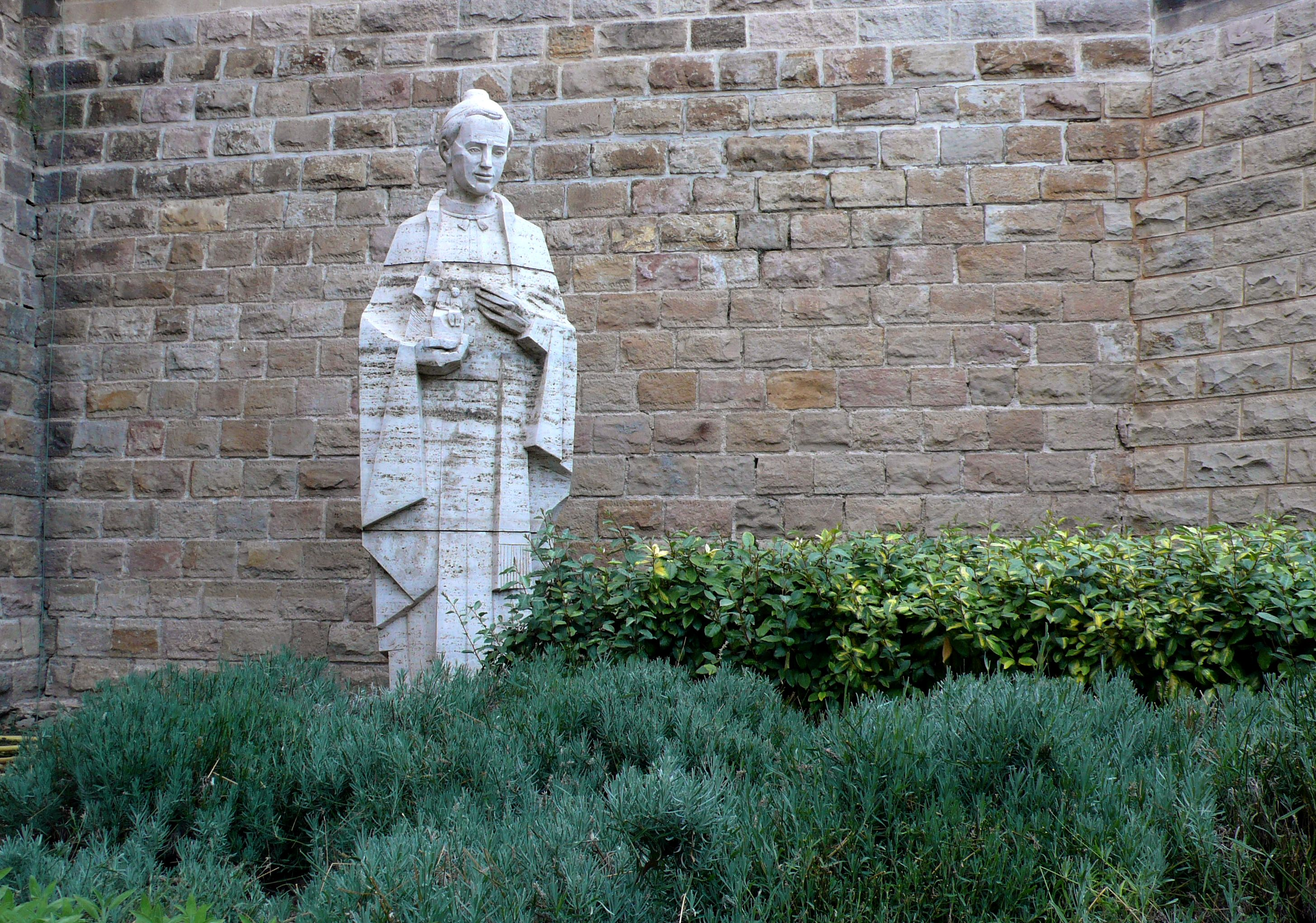 Estatua de San José Manyanet, obra de Francesc Carulla i Serra, situada en la Sagrada Familia, Barcelona.